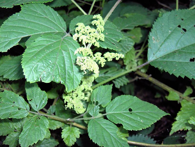 Spikenard